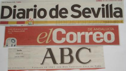 Periódicos editados en Sevilla